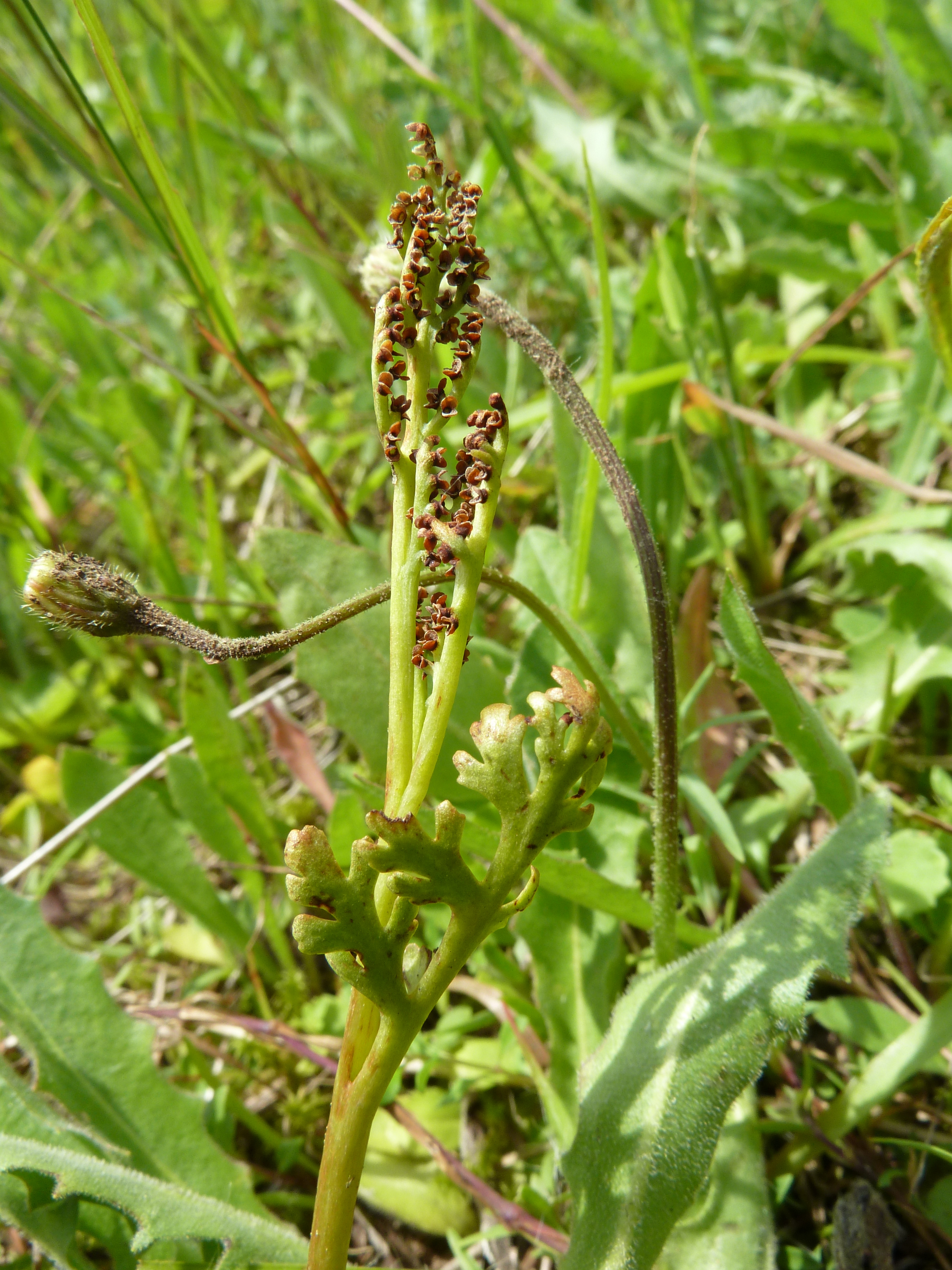 vratička heřmánkolistá (Botrychium matricariifolium)